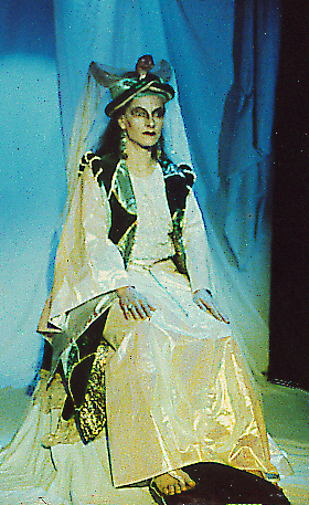 Solen' rolante Meluzina.